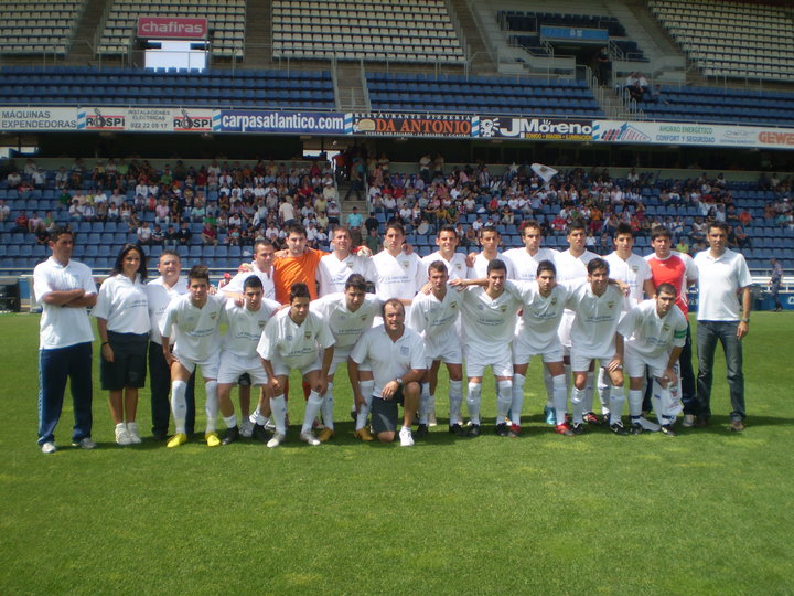 Iberia Septiembre 2010.